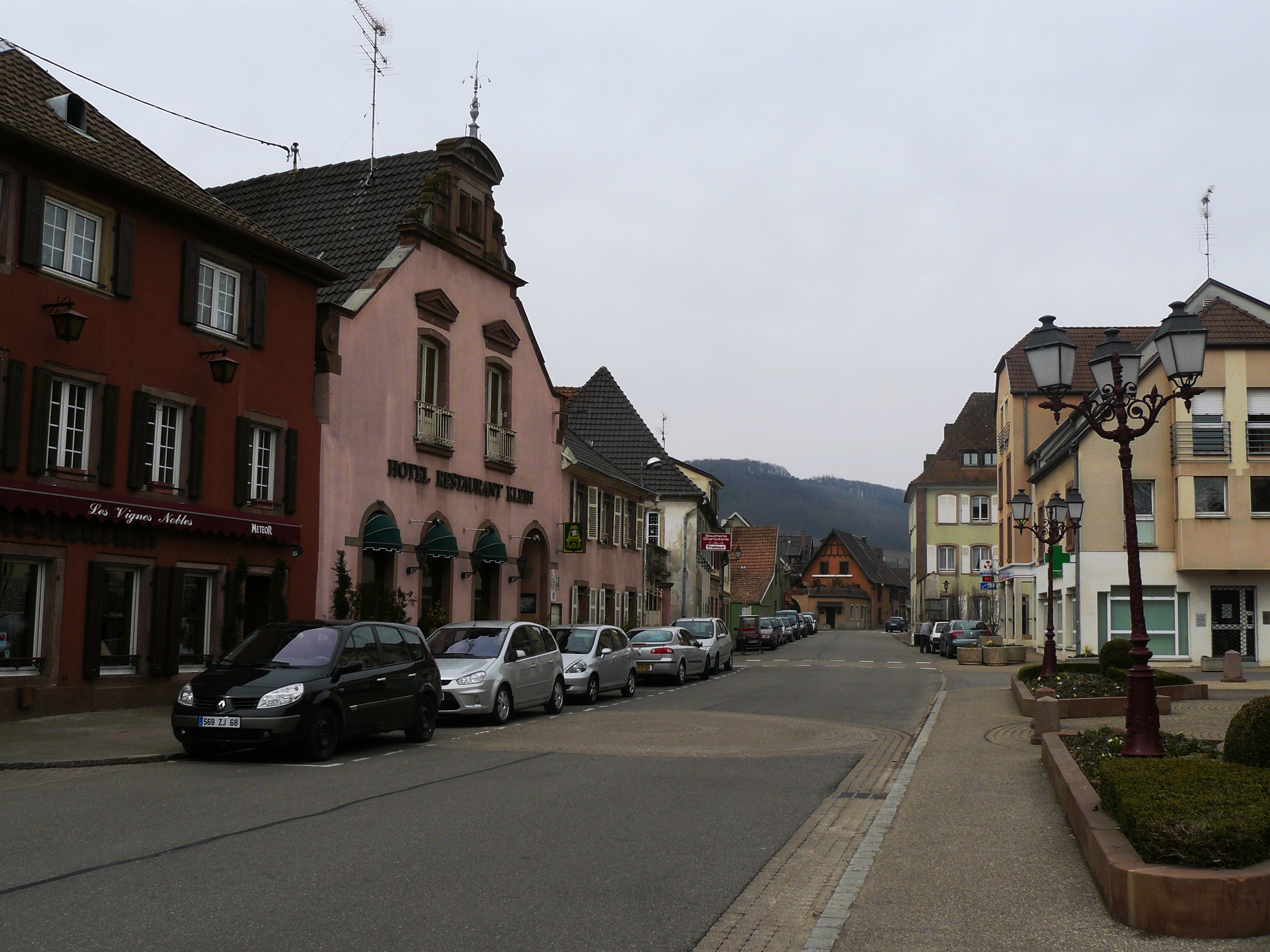 Artère principale de Soultzmatt